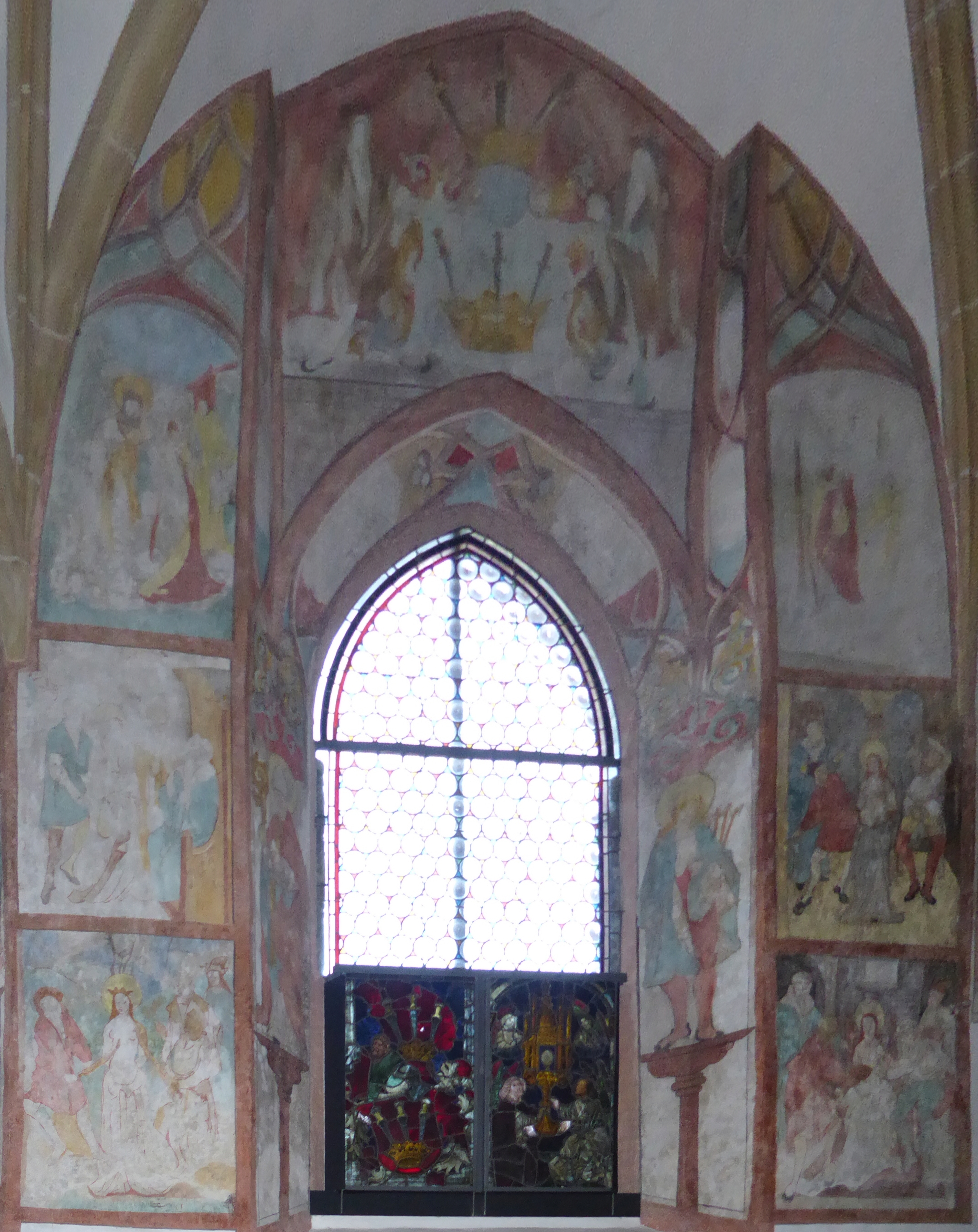 Bürgerspitalkirche hl. Katharina, Eberhard-Platz, Waidhofen an der Ybbs, Niederösterreich - Fresken Leben der hl. Agatha an der Südwand des rechten Seitenschiffs